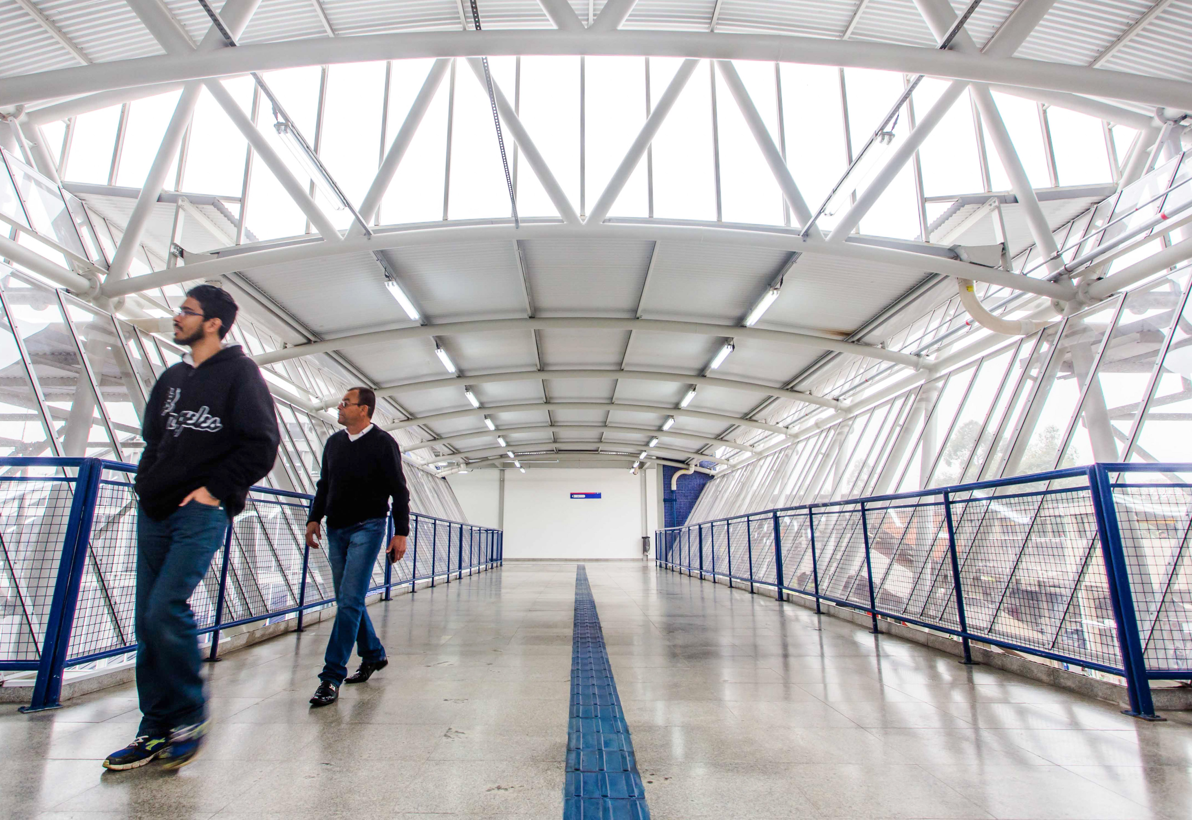 O Governador do Estado de São Paulo, Geraldo Alckmin, participou da Inauguração do Terminal da EMTU (Km 21) + Publicação do Edital de 2 licitações para o corredor Oeste. Local: Osasco/SP. Data: 16/08/2017. Foto: Alexandre Carvalho/A2img